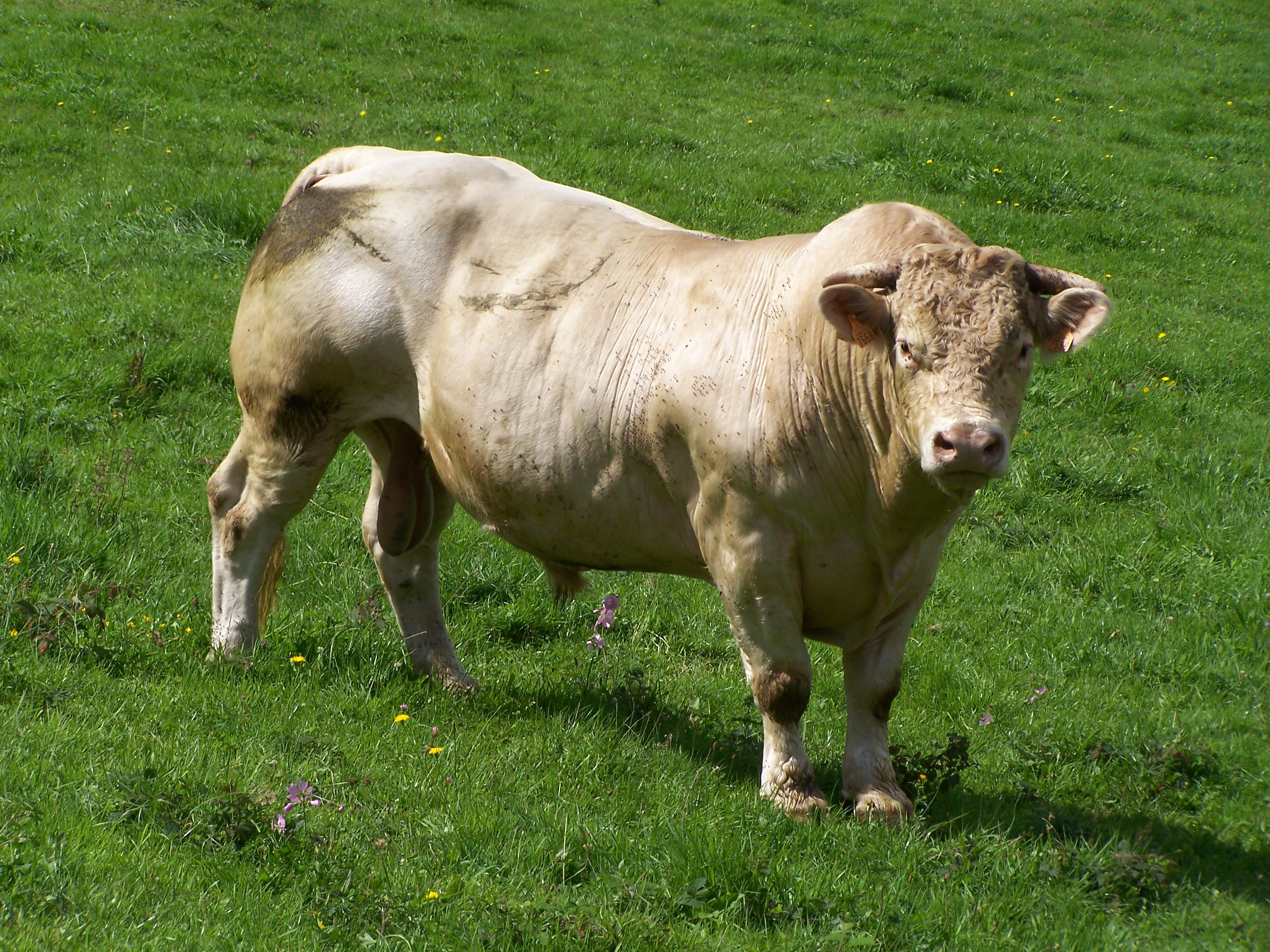 Taureau de race Charolaise dans le Morvan (Château-Chinon (Campagne), Nièvre, France)